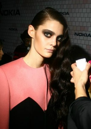 Marina Perez